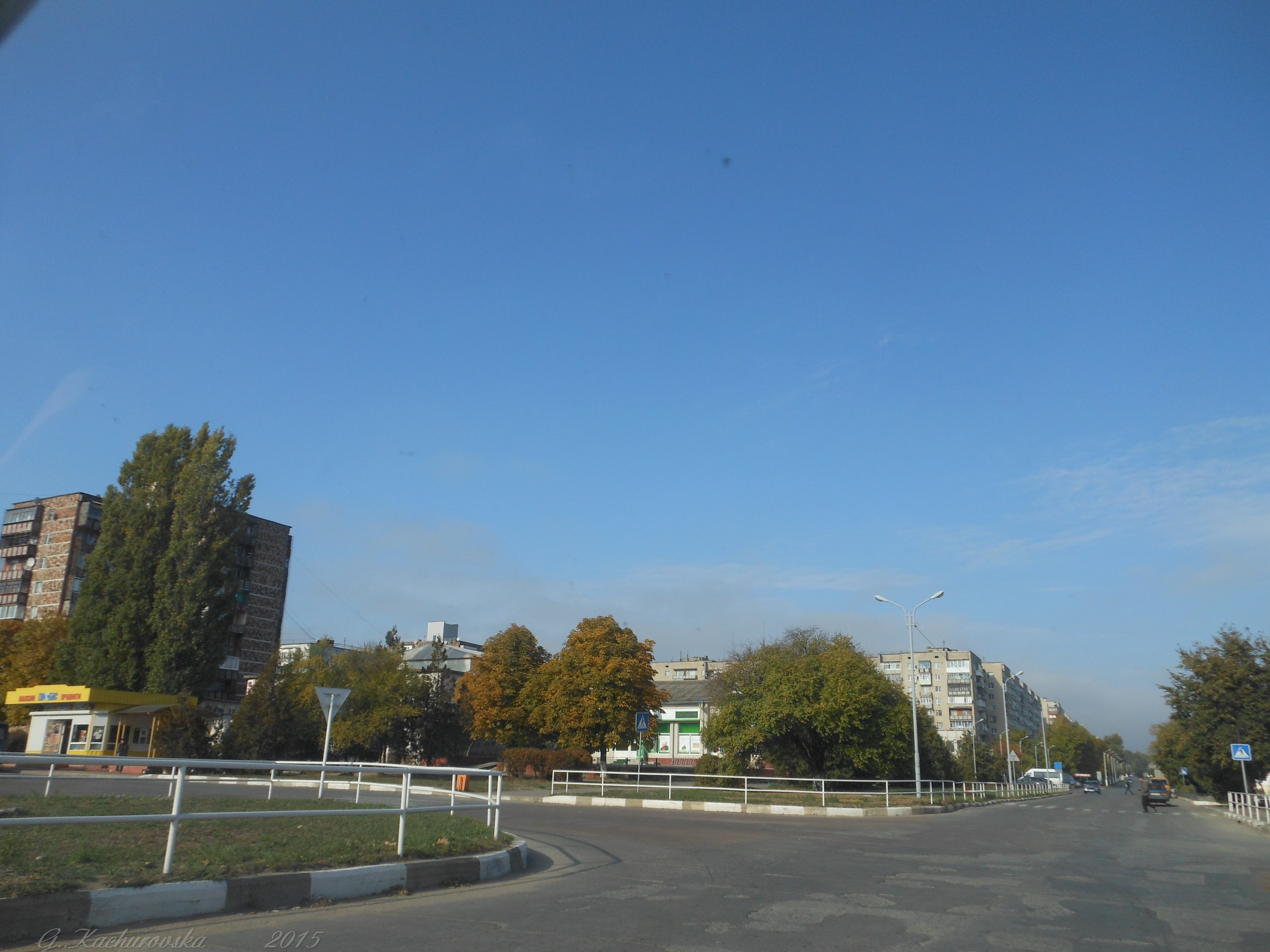 Новодністровськ, Чернівецька обл